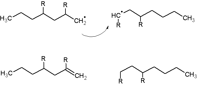 polimerização radicalar